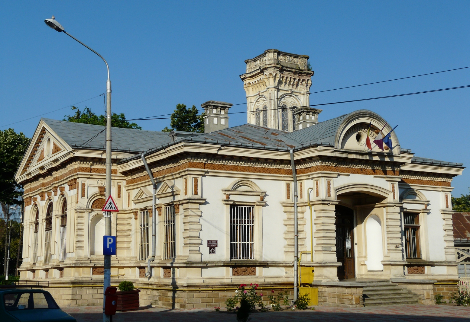 Biblioteca George Radu Melidon din municipiul Roman